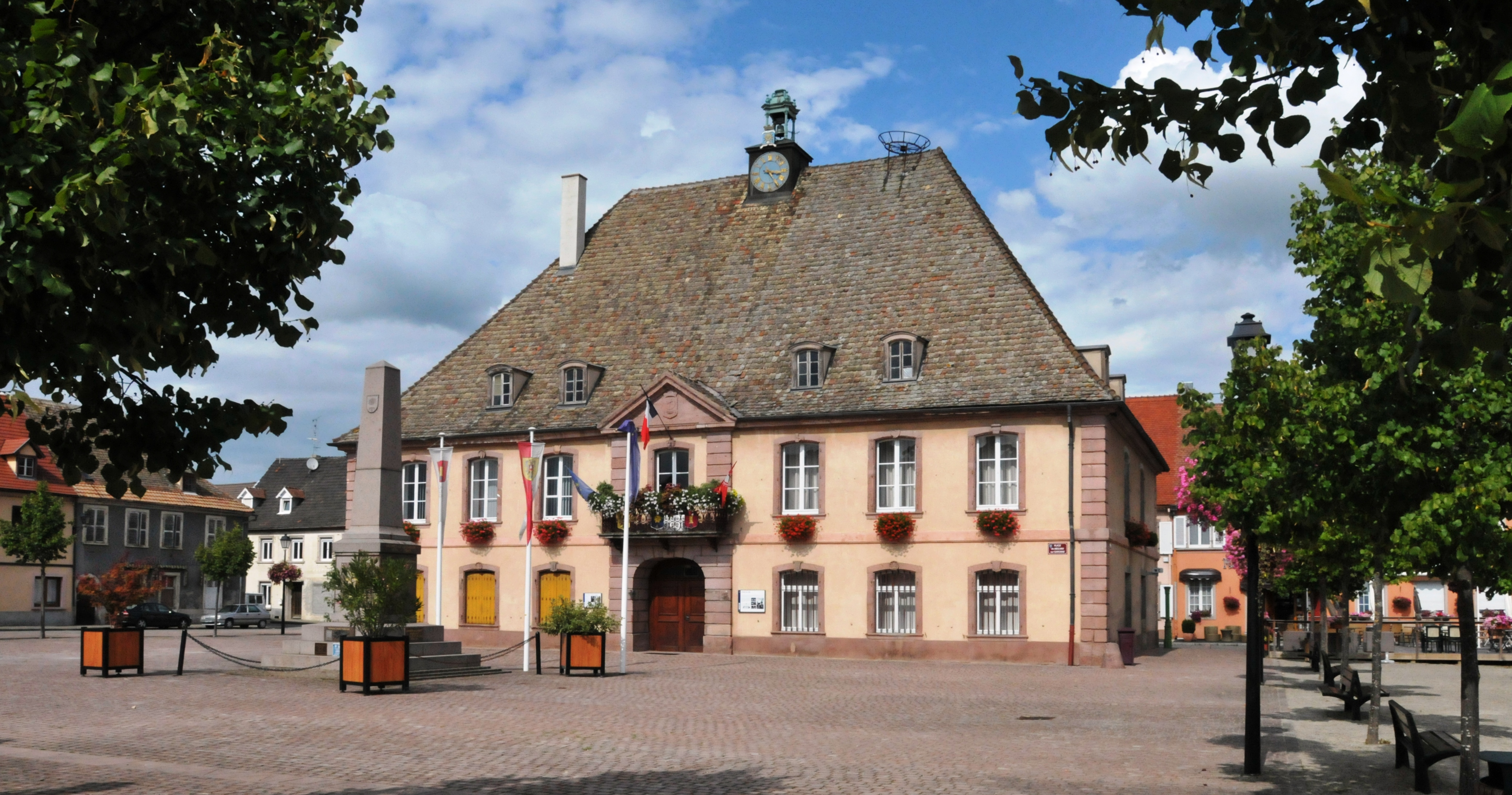 Rathaus von Neuf-Brisach